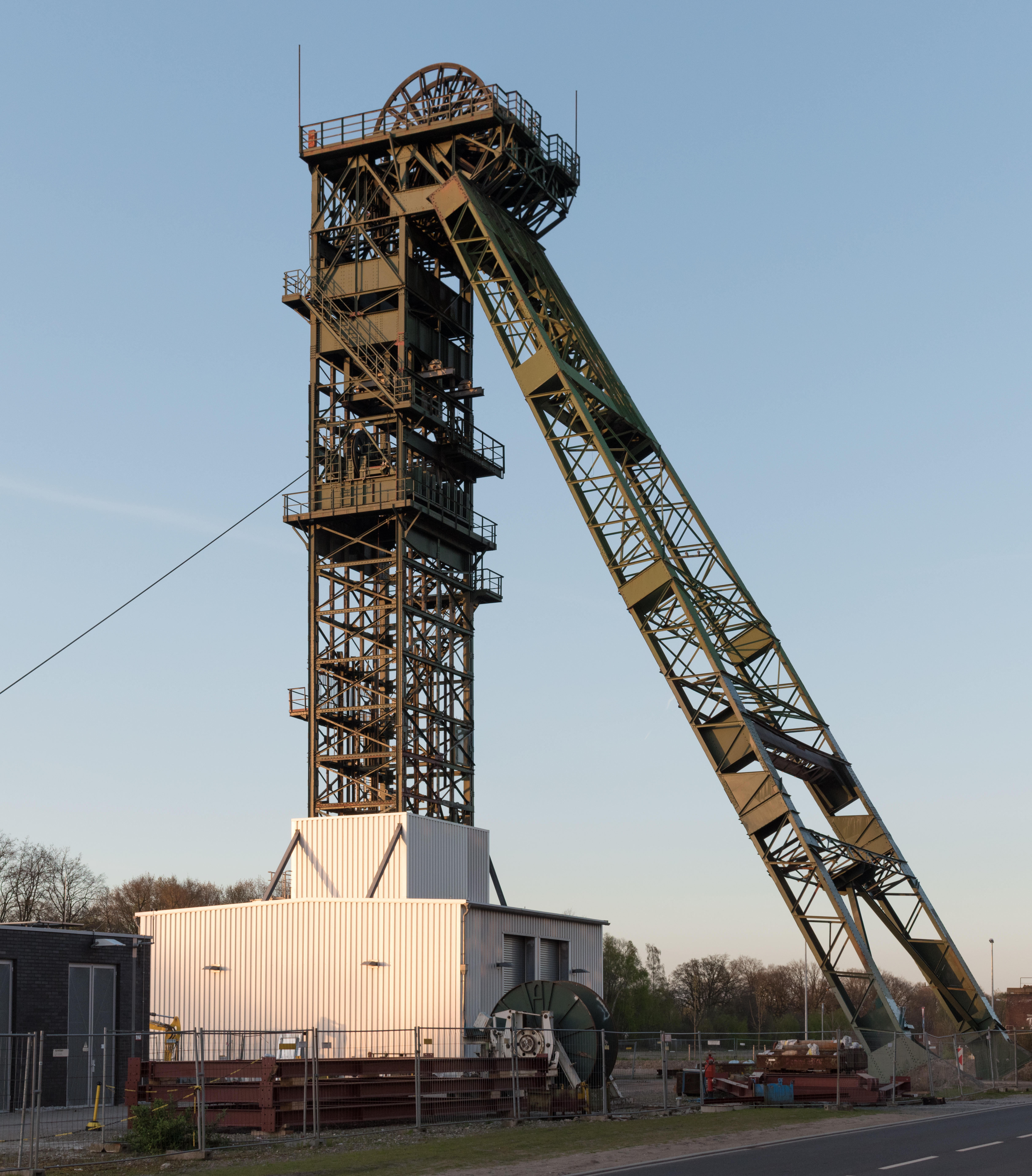 Alter Förderturm auf dem ehemaligen Geländes des Bergwerks Fürst Leopold, heute "CreativQuartier Fürst Leopold", Nordrhein-Westfalen, Deutschland